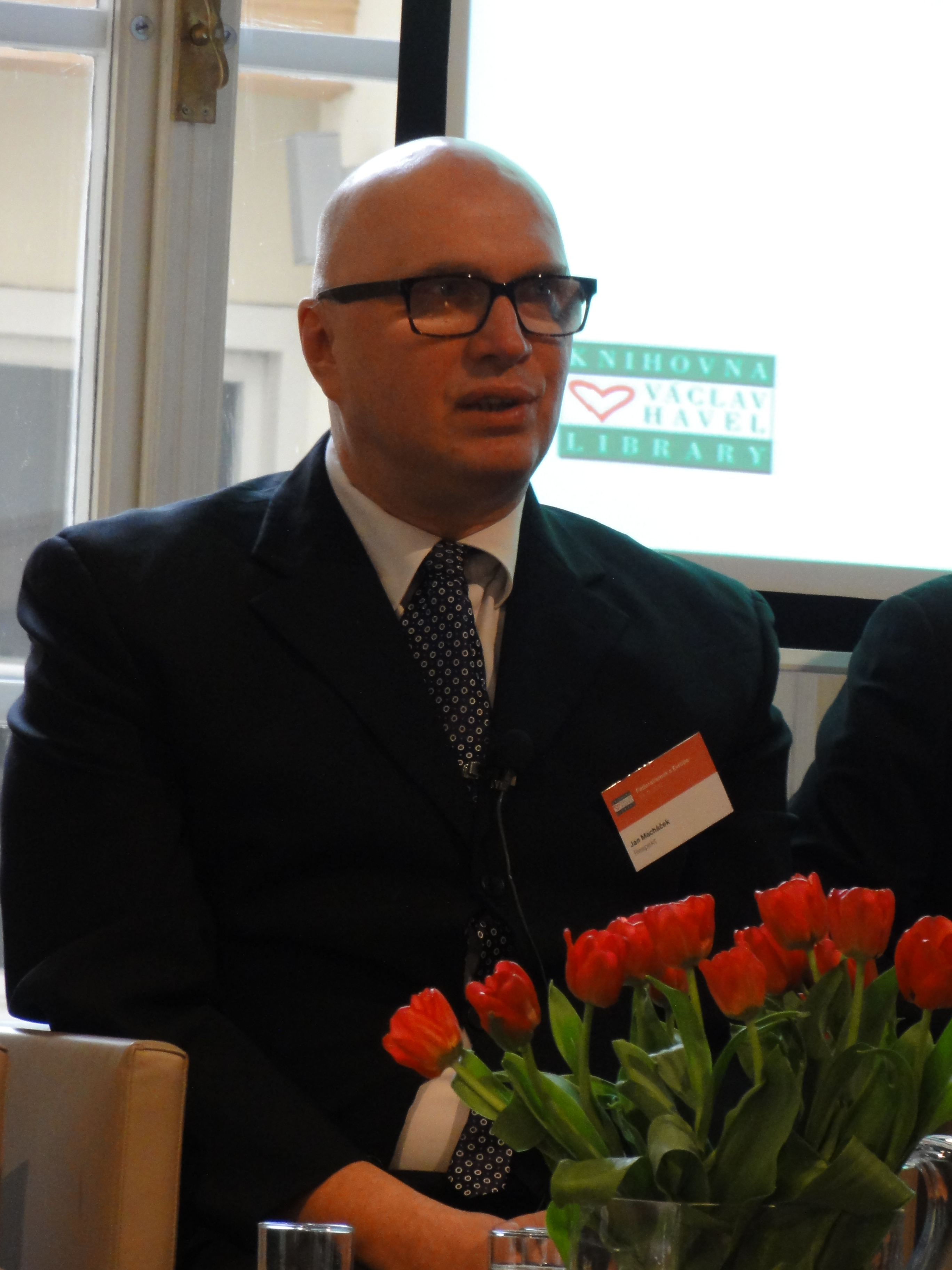 Jan Macháček na konferenci "Federalismus a Evropa" pořádané Knihovnou Václava Havla v prostorách University of New York in Prague.